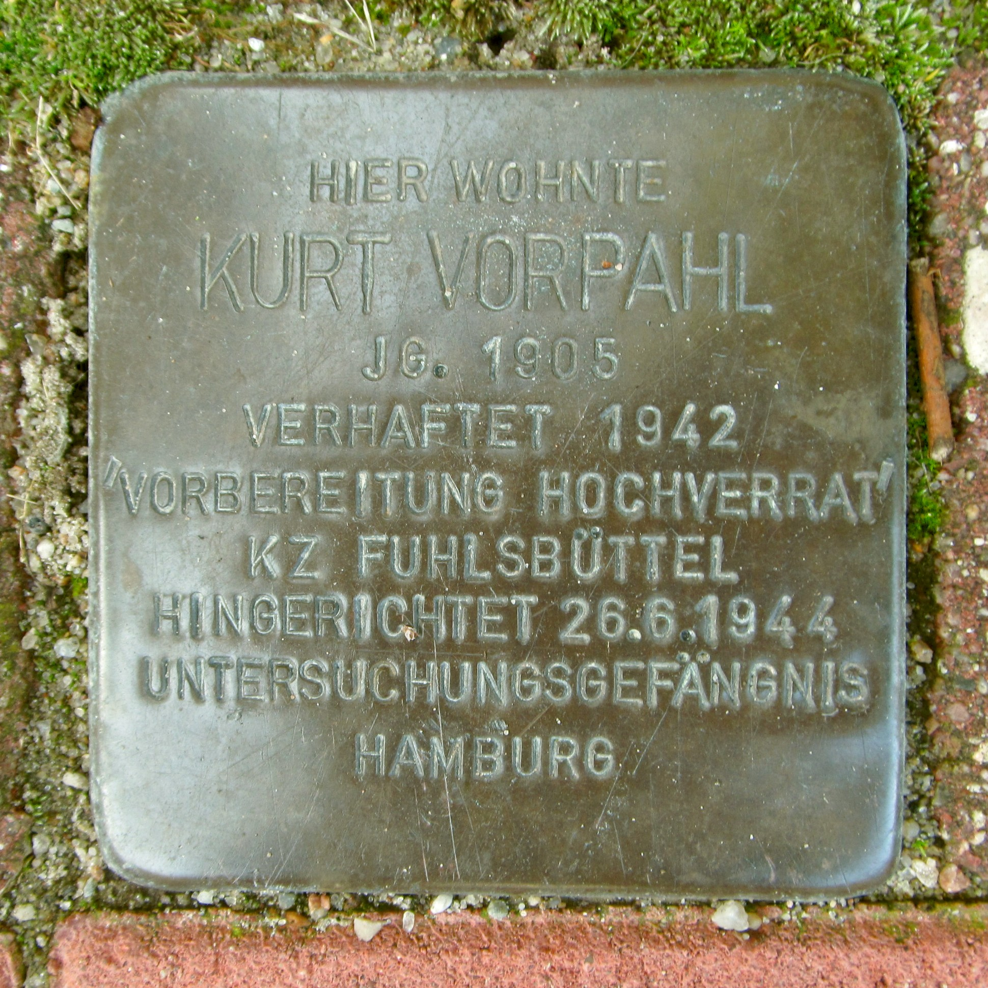 Stolperstein für Kurt Vorpahl, Snitgerstieg 3 in Hamburg-Horn